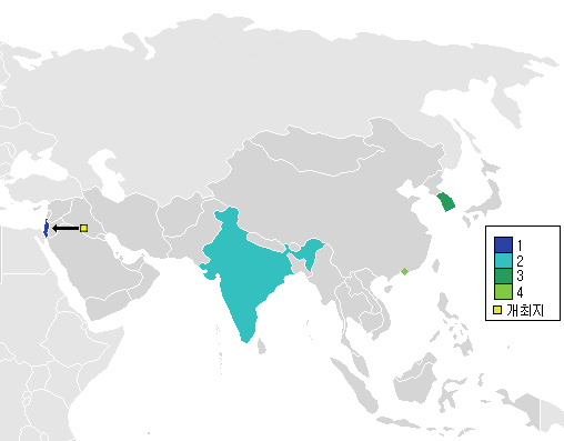 1964년 AFC 아시안컵 정보